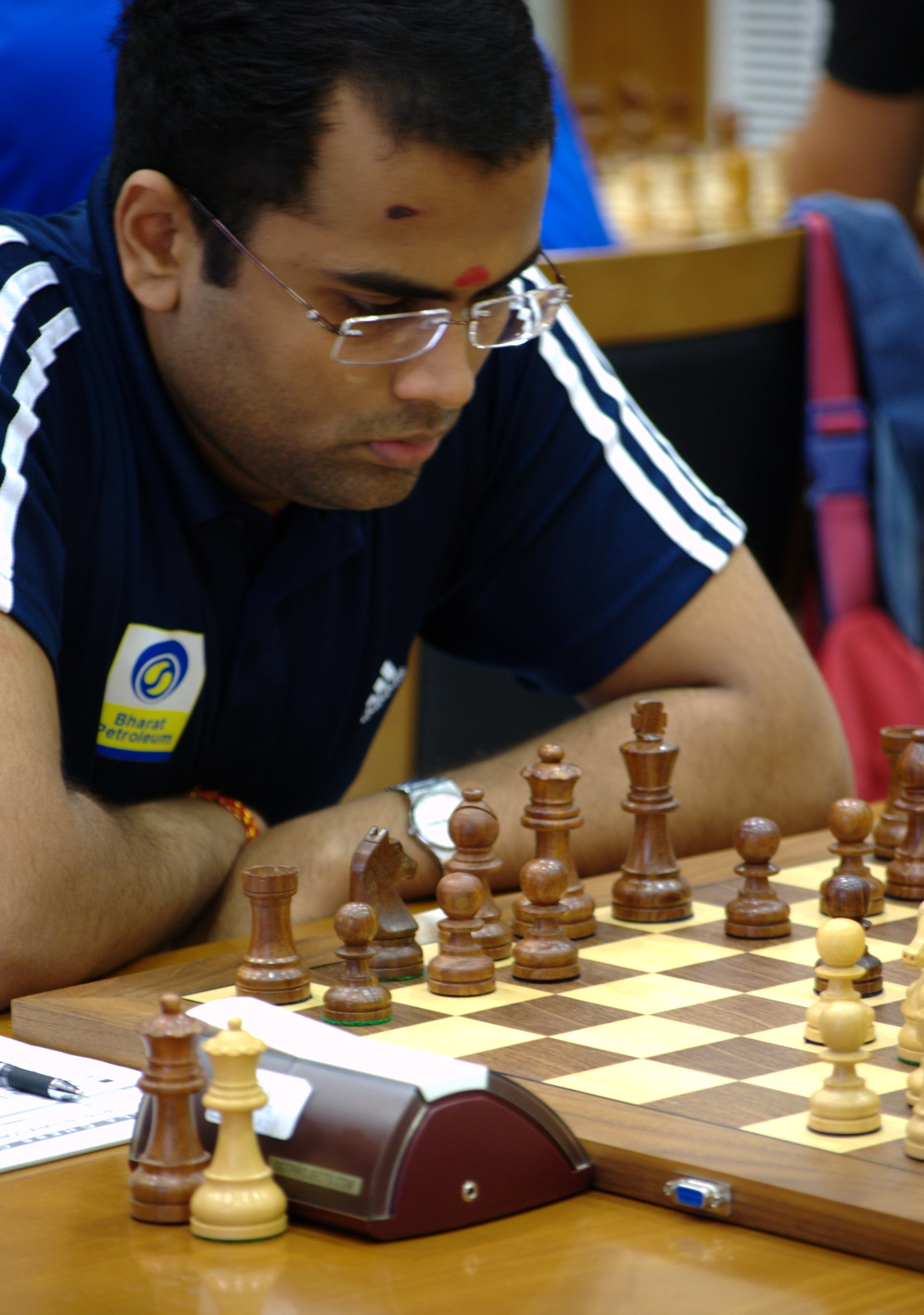 GM Gopal G N (India), Kavala Open 2011